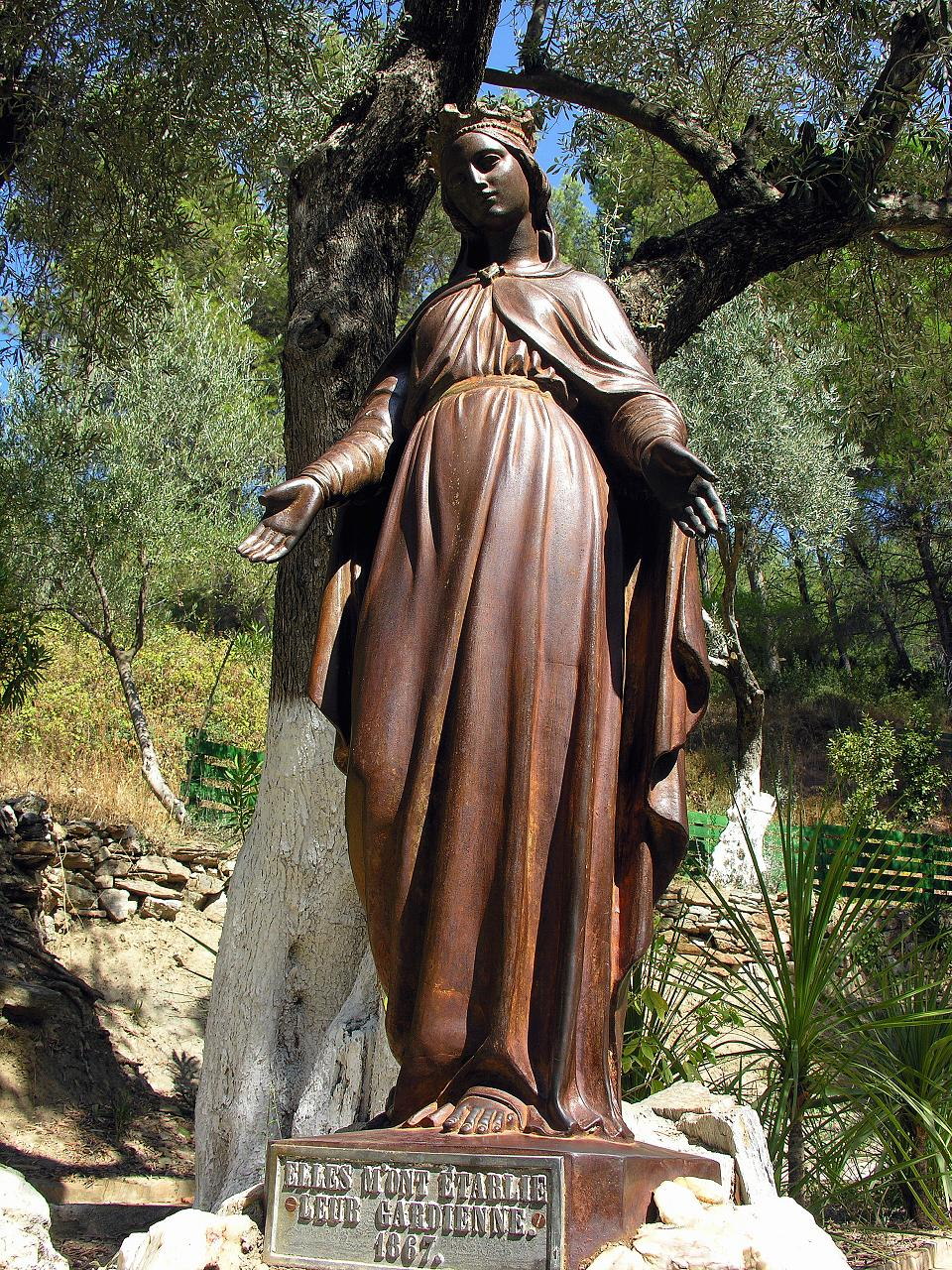 Turkey-2839